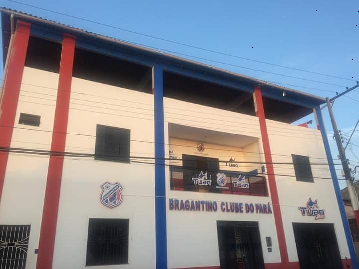 Sede social do Bragantino Clube do Pará, localizada na cidade de Bragança.